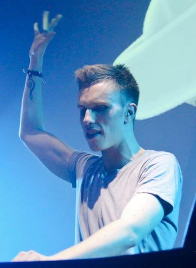 Holadský dj a producent Nicky Romero